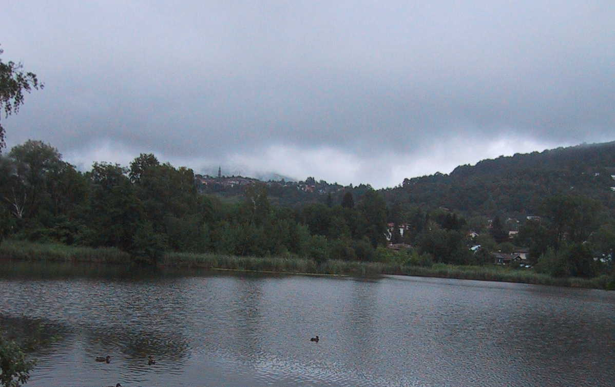 Lago di Origlio, Kanton Tessin